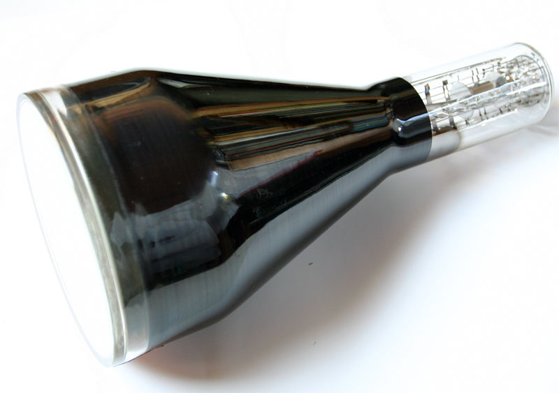 Kathodestraalbuis, eigen foto september 2004, hiermee onder GFDL gebracht